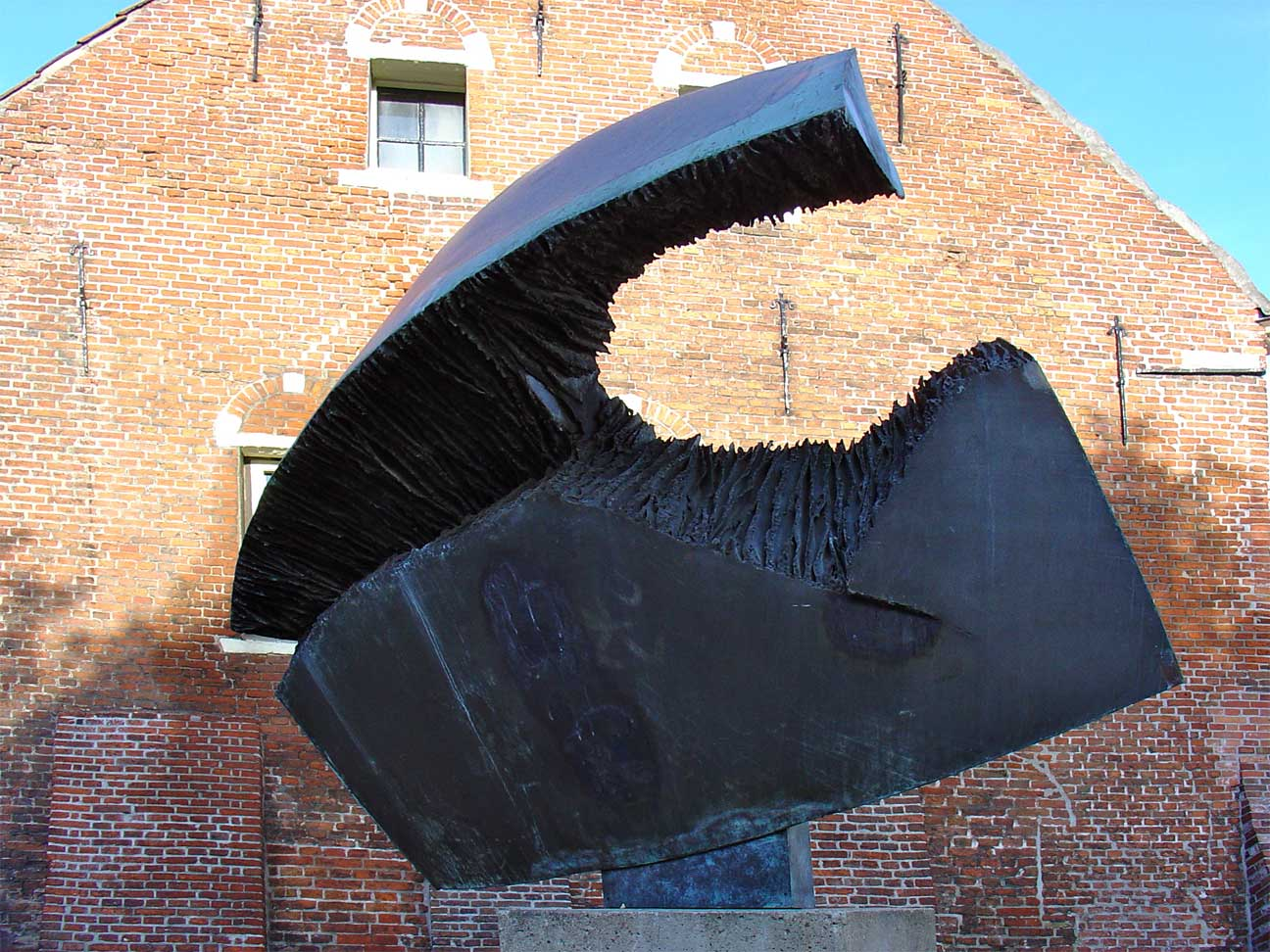 De grote verscheuring door Pierluca degli Innocenti, Gedempte Kattendiep te Groningen